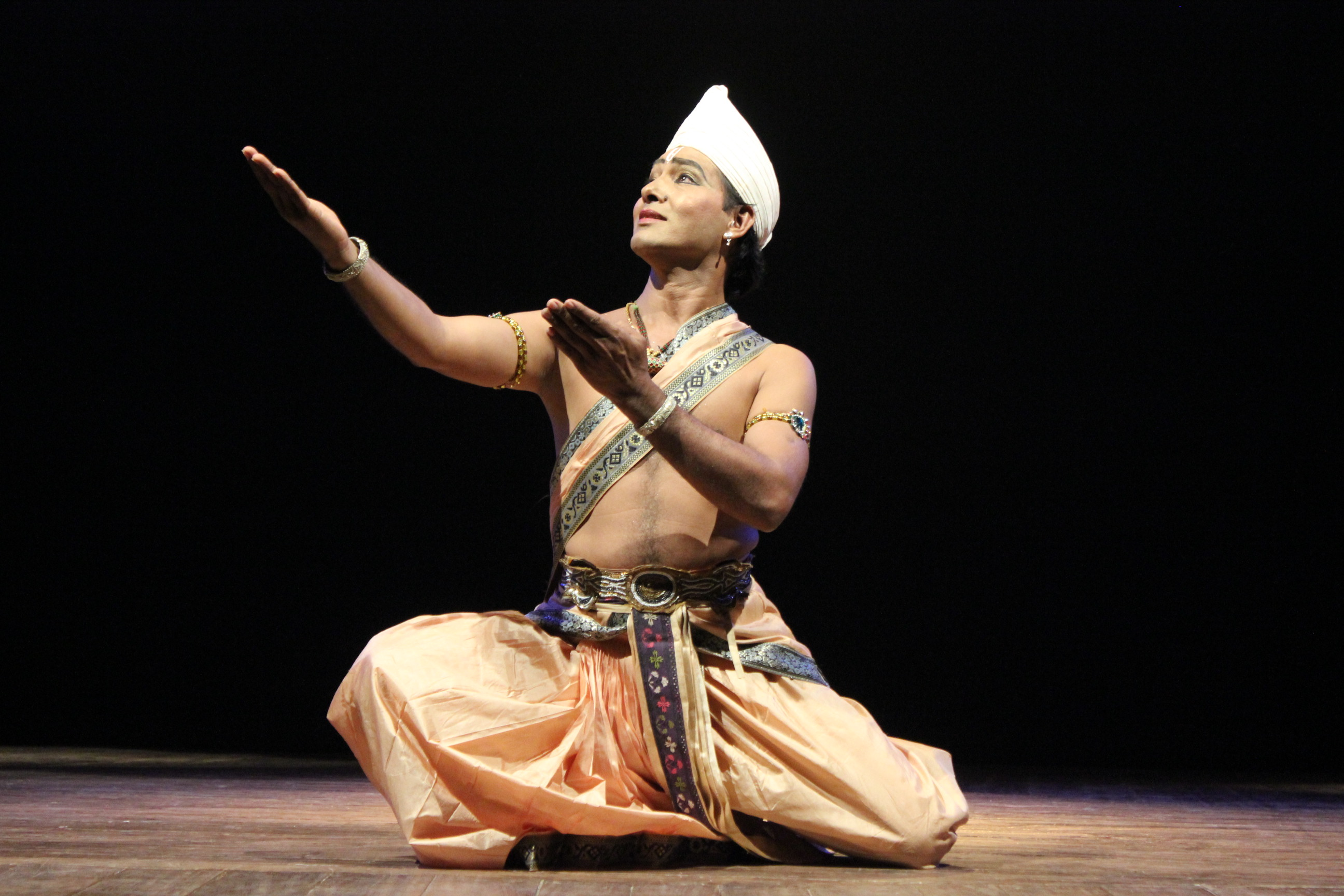 অসমীয়া: গুৱাহাটীৰ ৰবীন্দ্র ভৱনত সঙ্গীত নাটক আকাদেমিৰ গুৱাহাটী শাখাৰ দ্বাৰা আয়োজিত ‘নৃত্য পর্ব’ অনুষ্ঠানত (১৫-১১-২০১১)সত্রীয়া নৃত্য পৰিবেশনাত গুৰু ৰামকৃষ্ণ তালুকদাৰ।